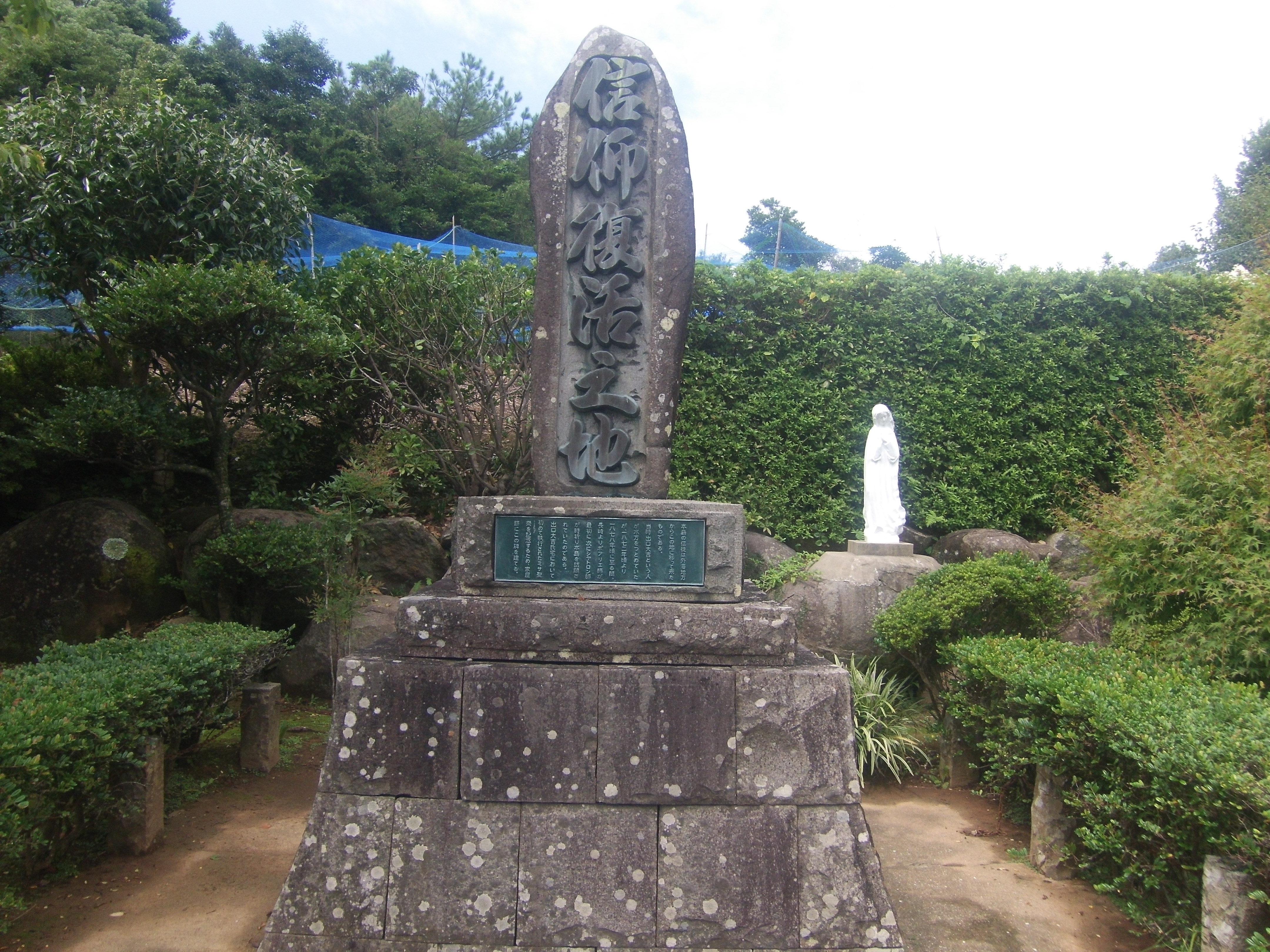 長崎県佐世保市黒島で潜伏キリシタンがカトリックに最初に復帰した場所に建つ記念碑、日数(ひかず)集落